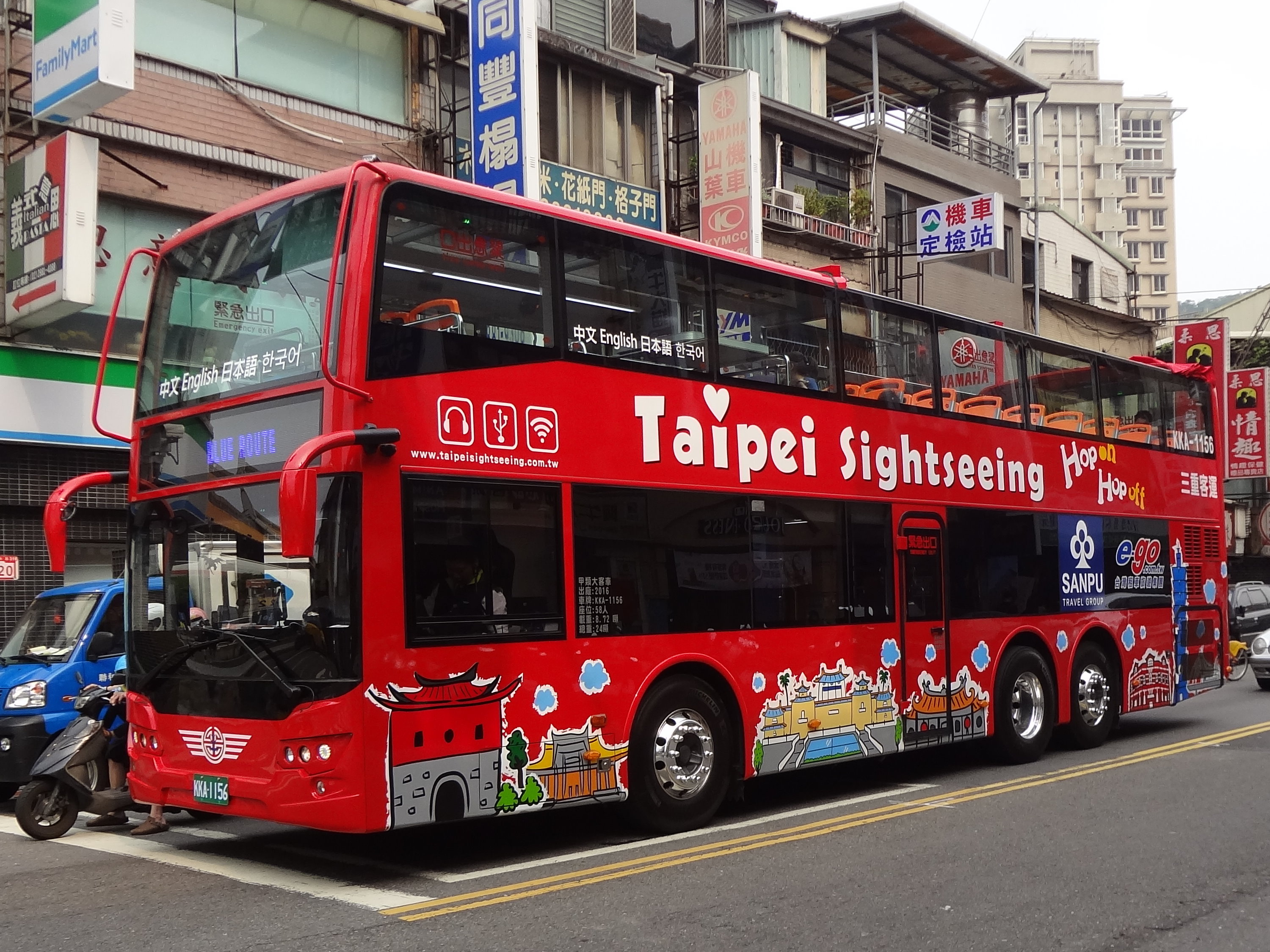 中文（台灣）: 三重客運Volvo B8RLE雙層低地板大客車KKA-1156於臺北市士林區文林路。